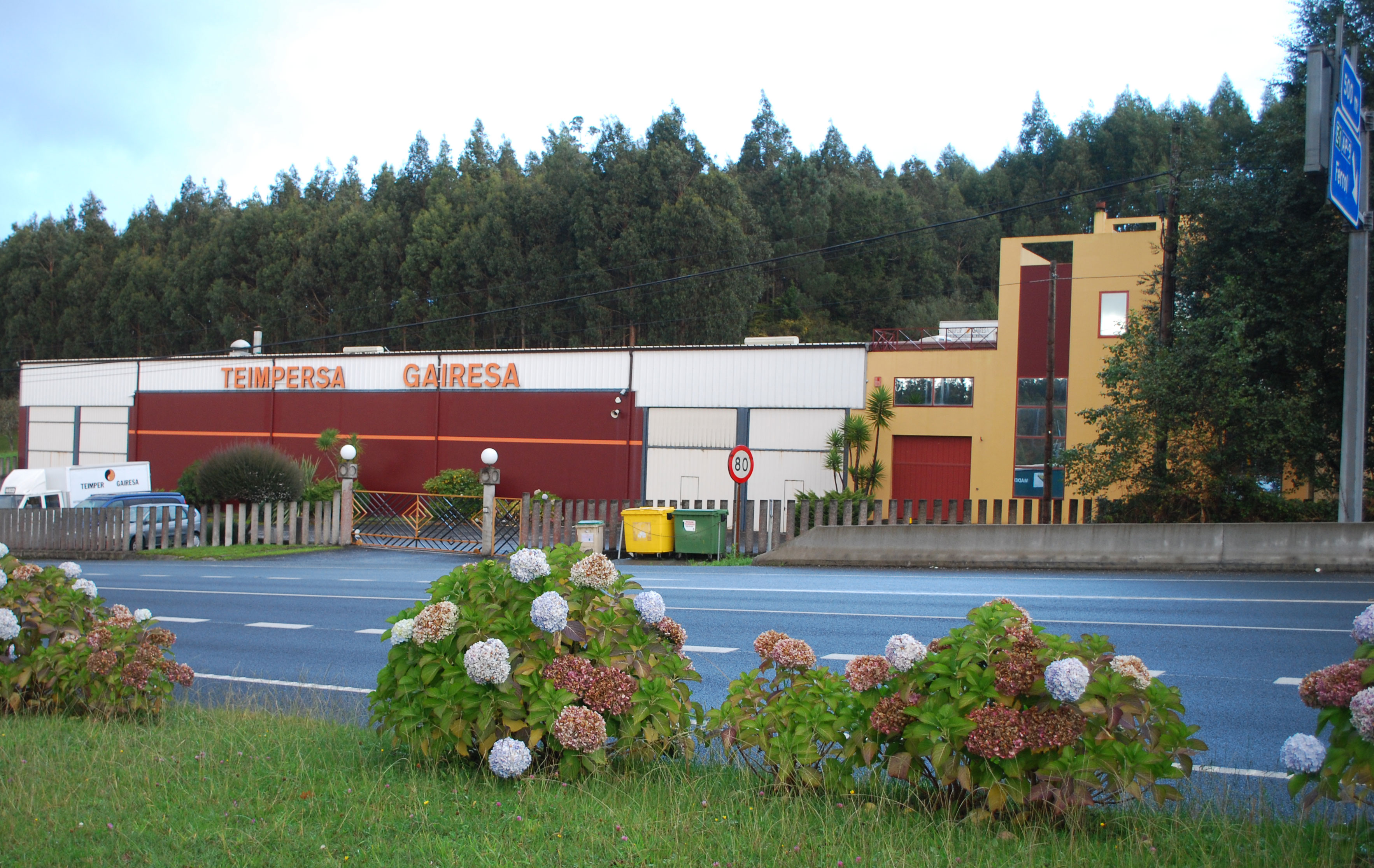 Gairesa Teimper en Fene estrada